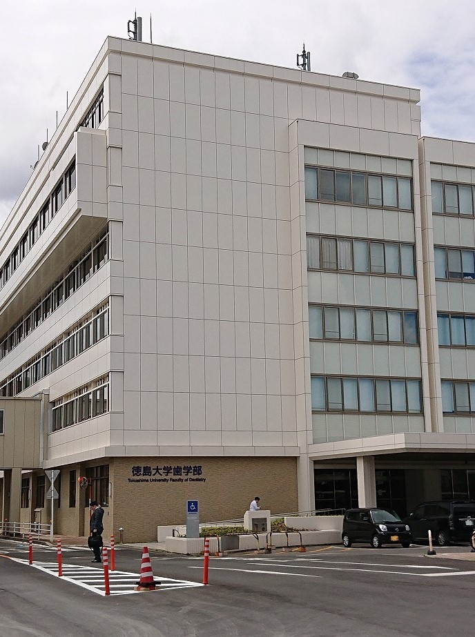 徳島大学蔵元キャンパスにある歯学部棟